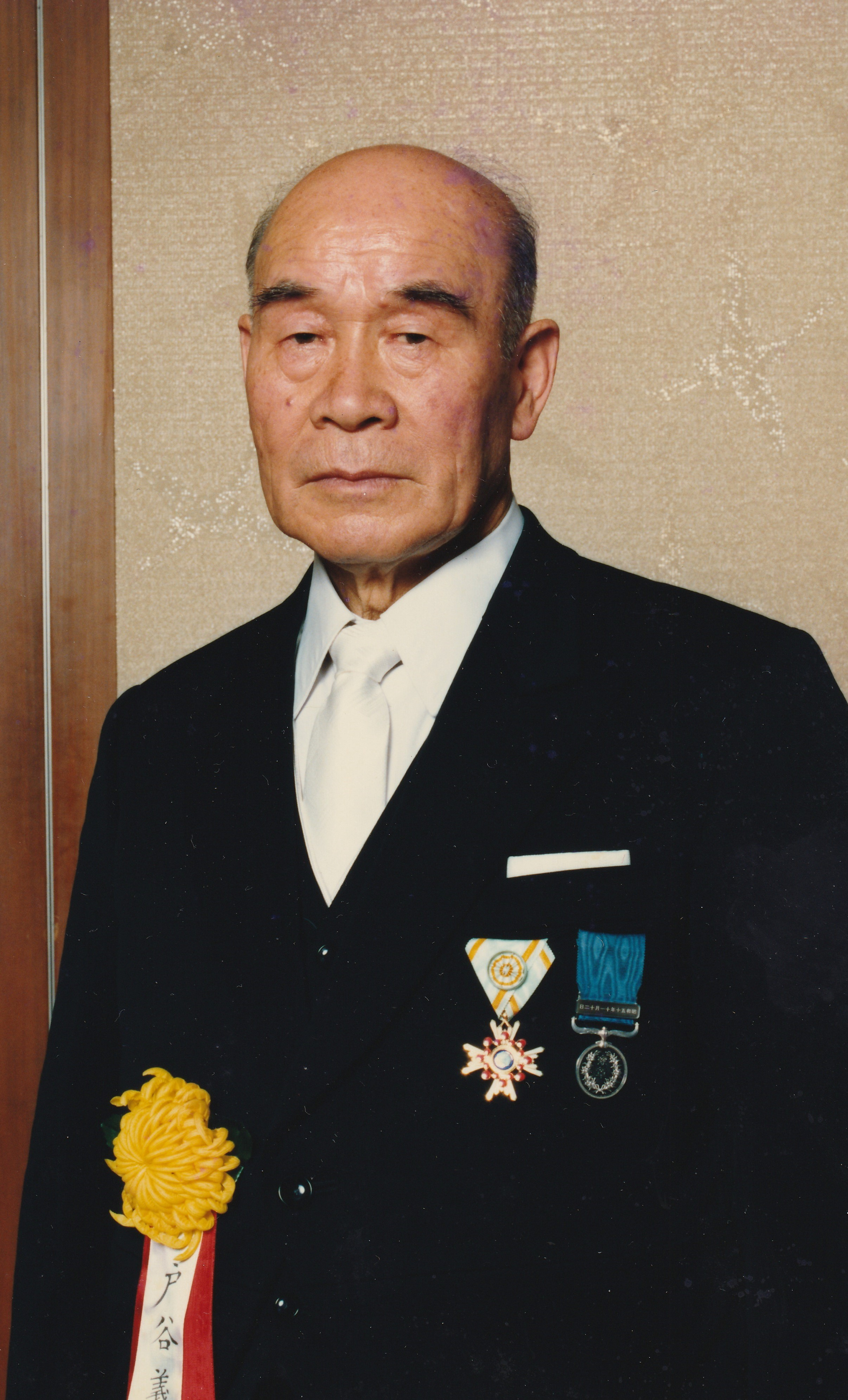 戸谷義次（昭和６３年当時）